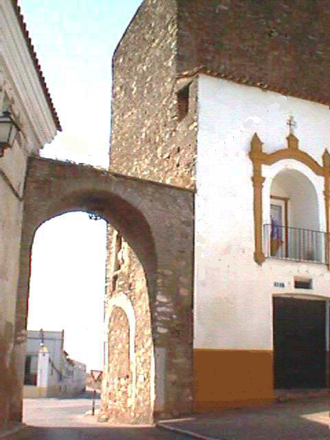 Arco del Cubo de Zafra por su parte intramuros